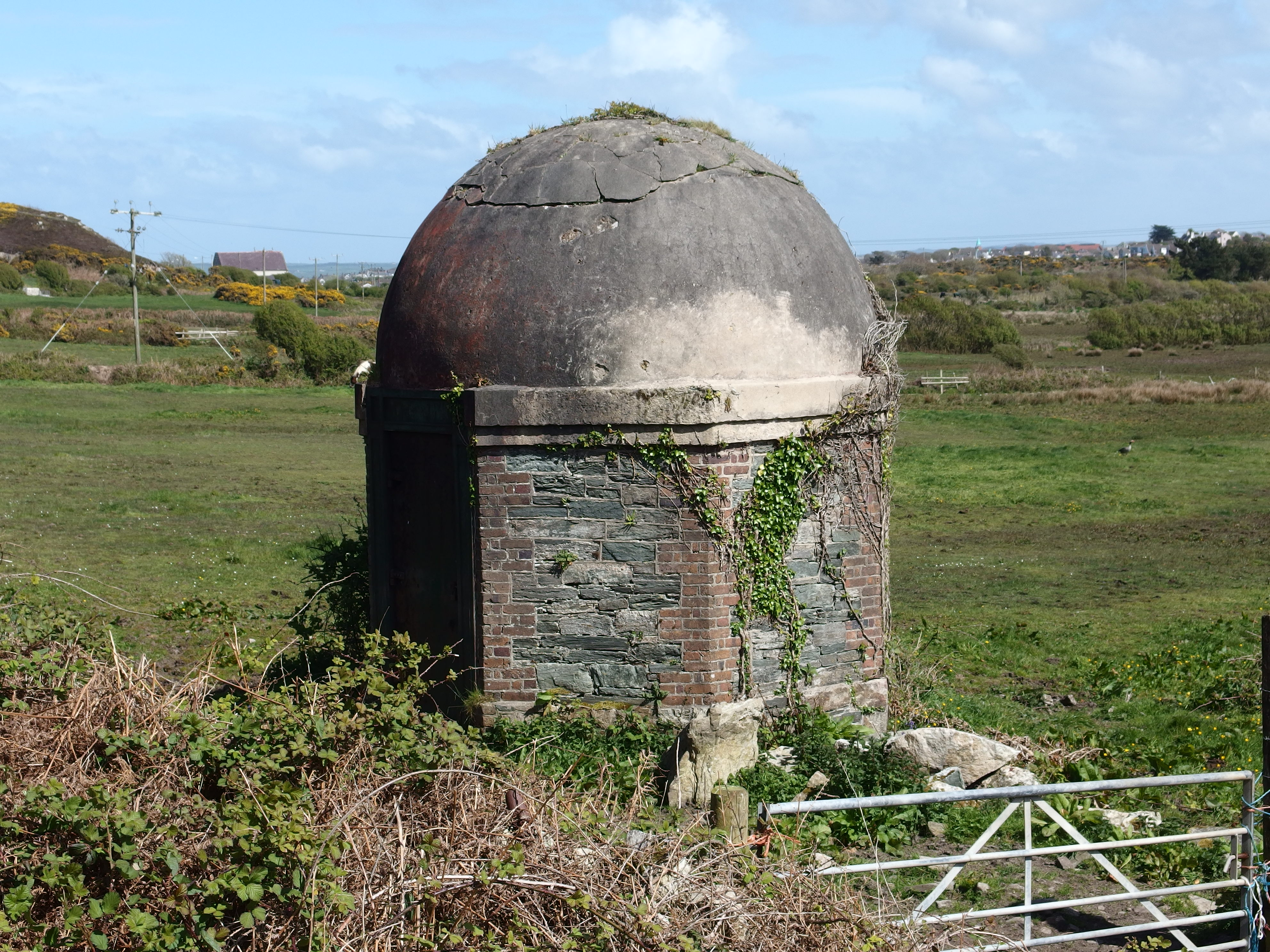 Ffynnon y Wrach